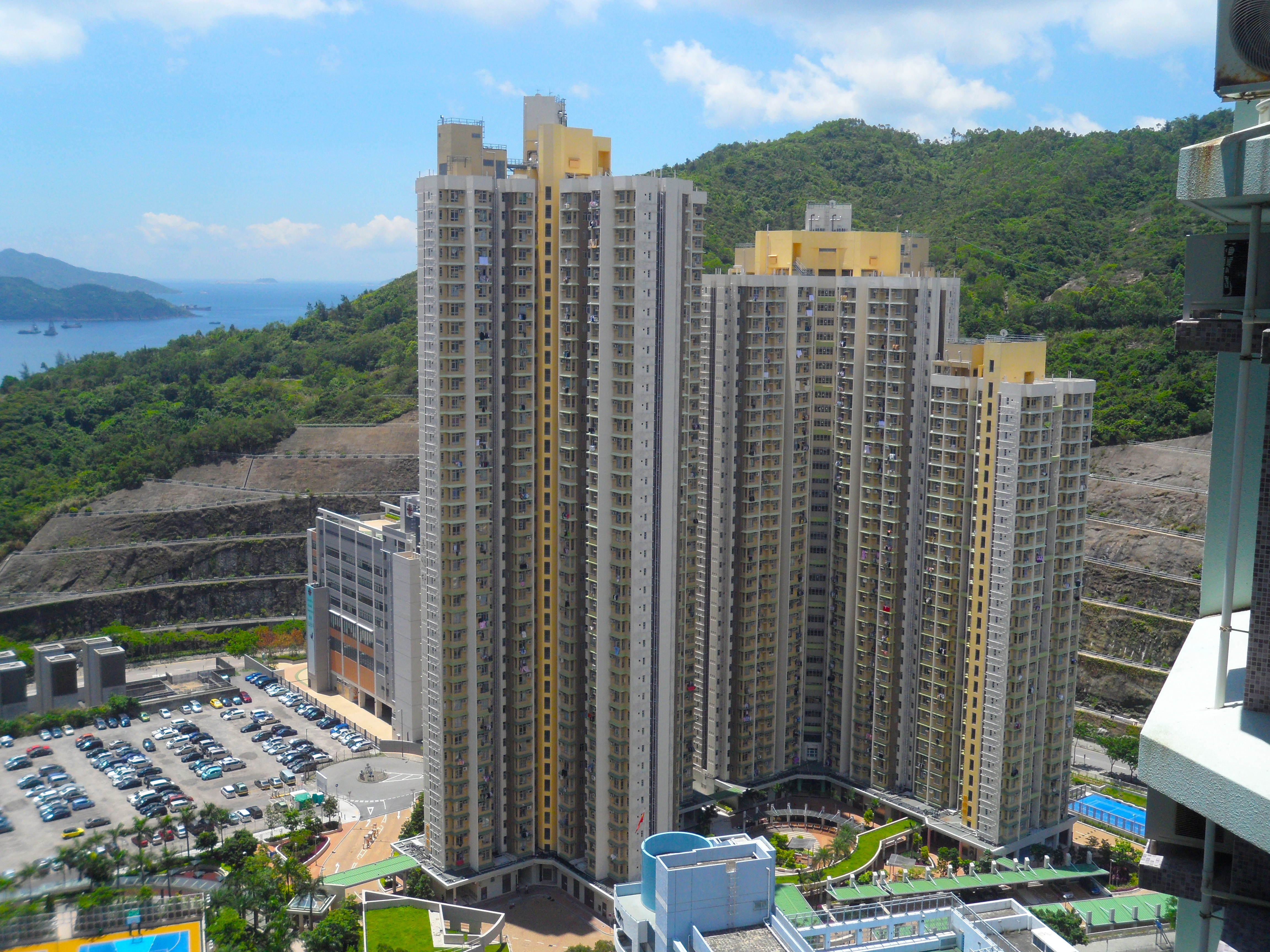 善明邨全景圖